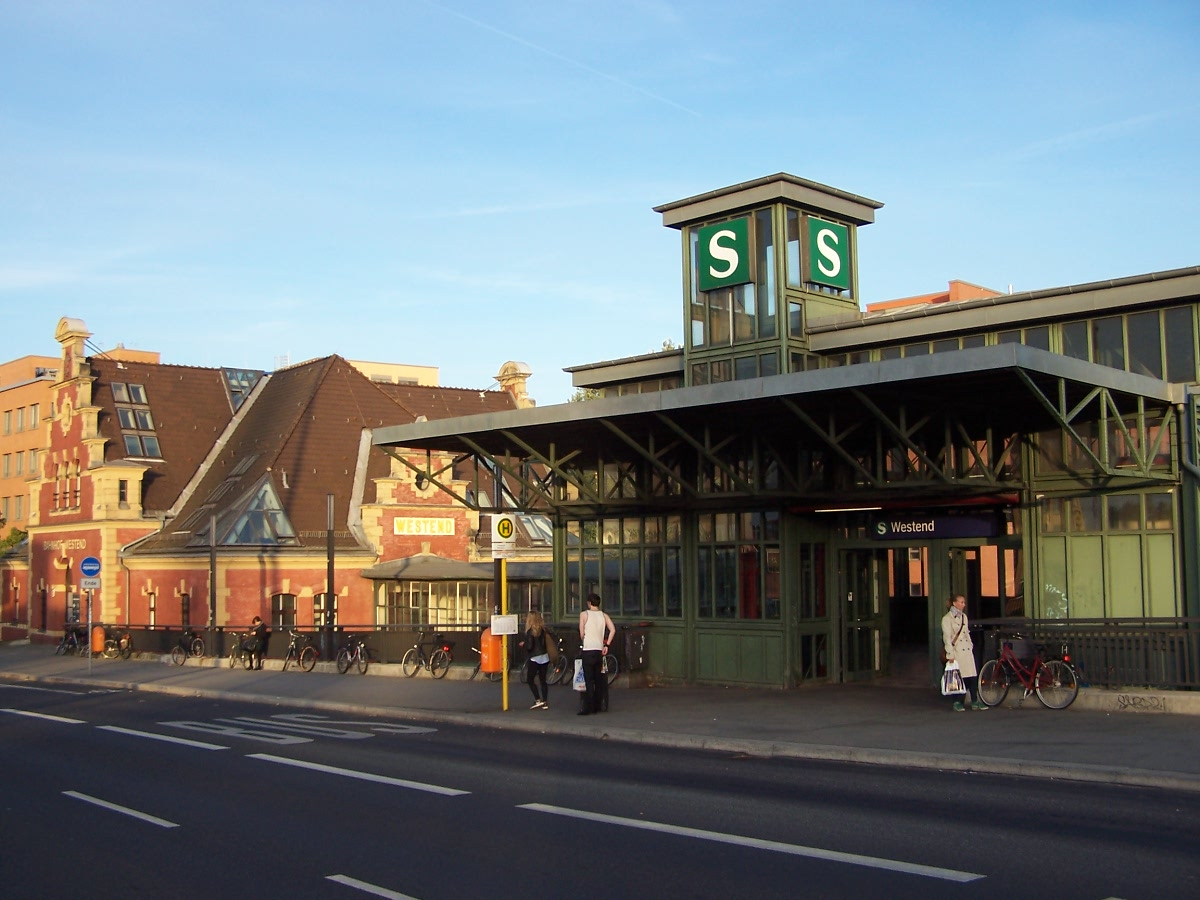 La nouvelle et l'ancienne entrée de la gare de Berlin-Westend, sur Spandauer Damm